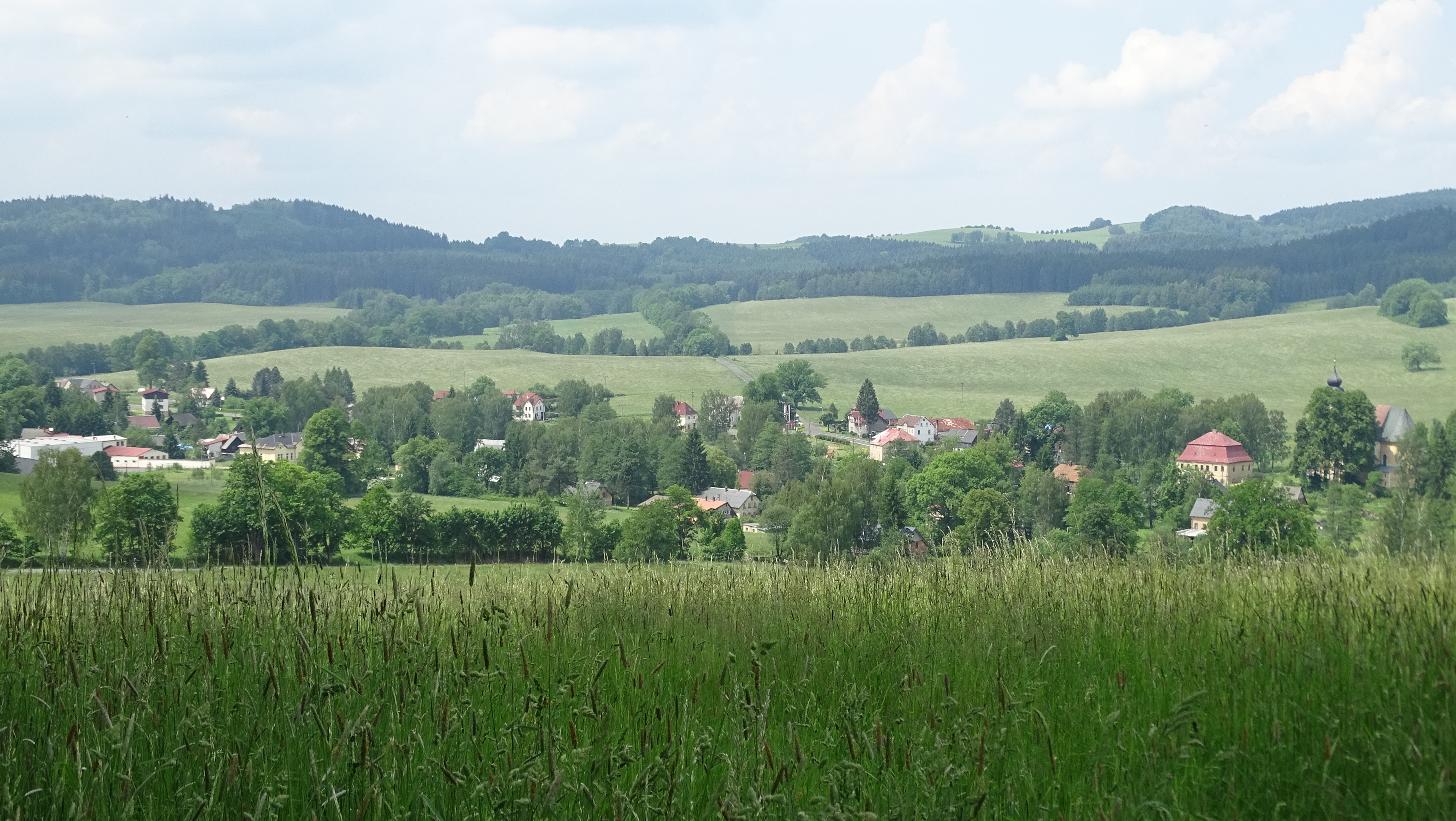 Standort Annaberg (Anenský vrch )